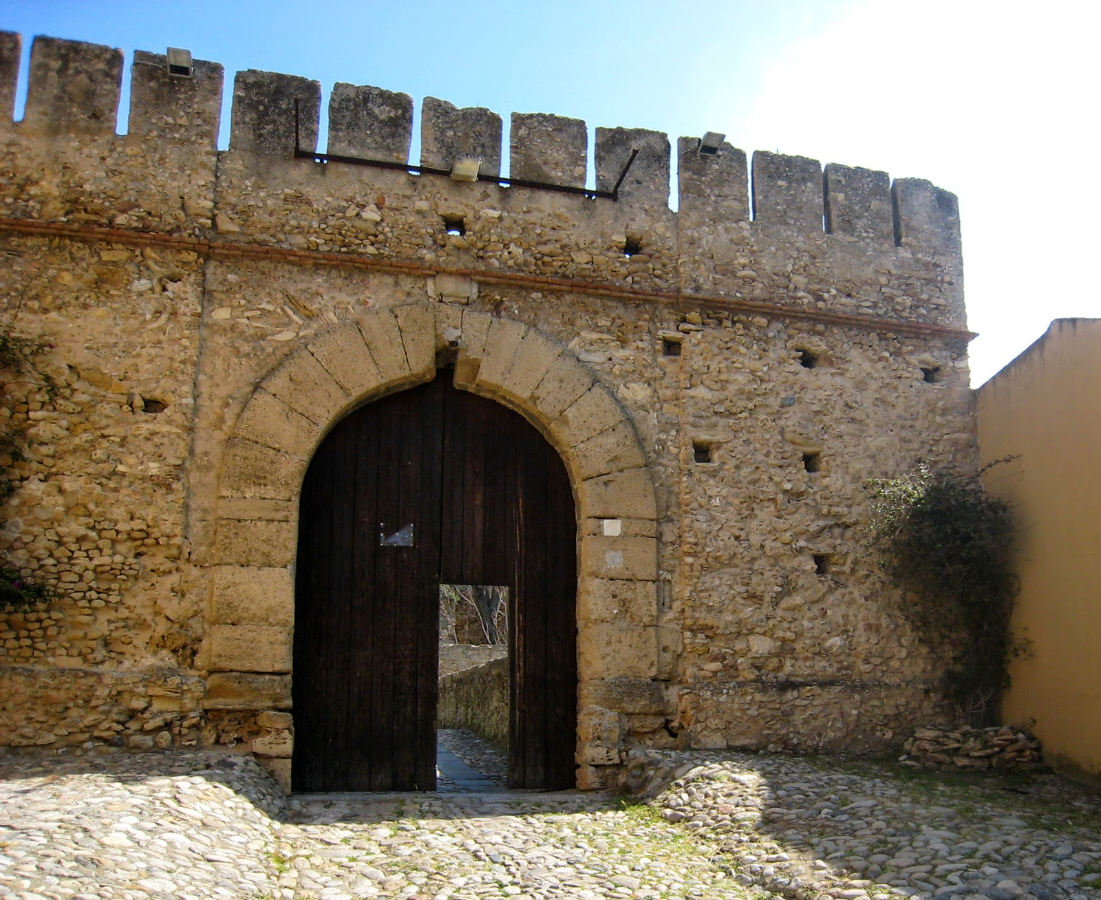 Crotone, Calabria, Italy. Castello di Carlo V.